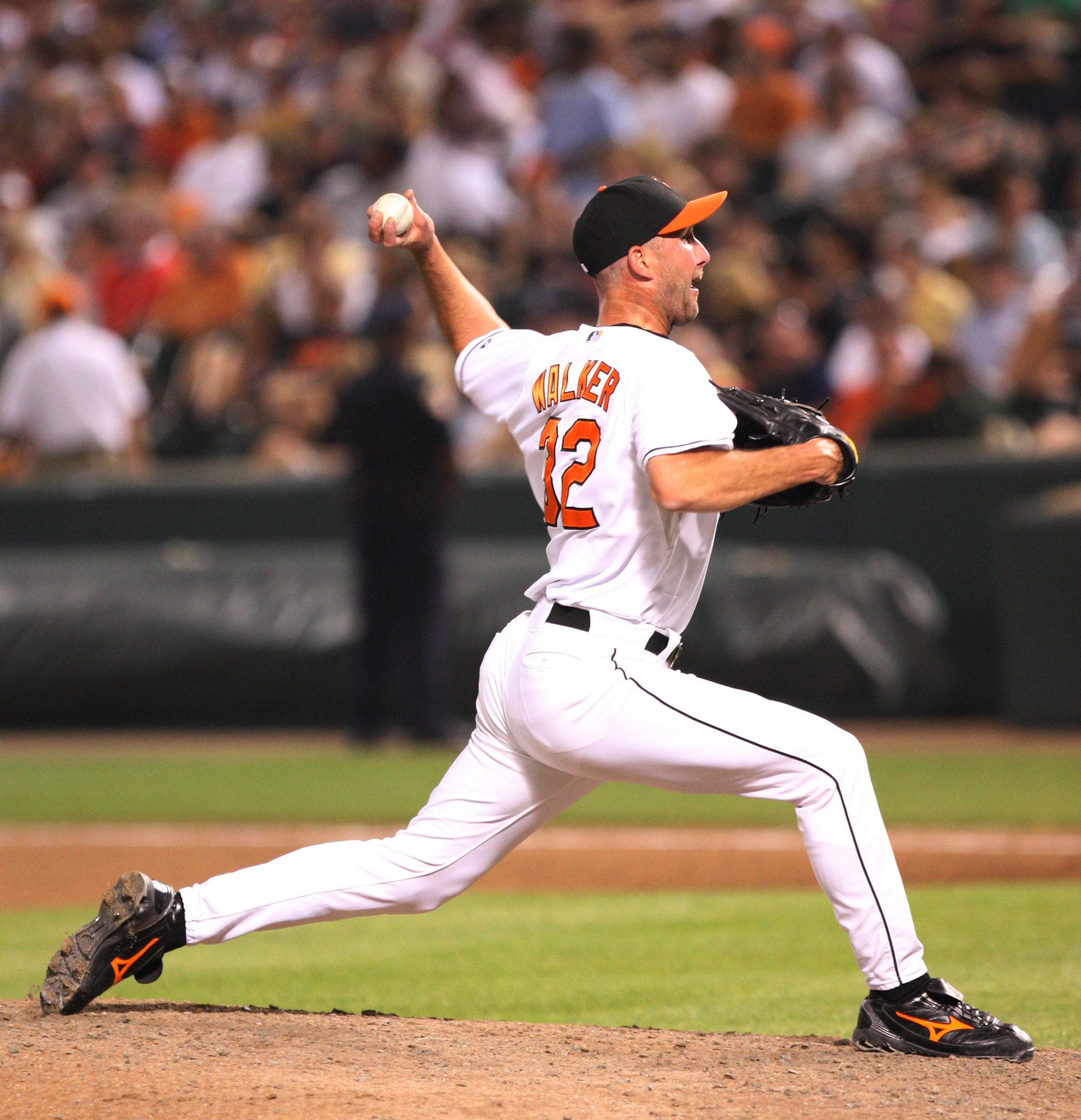 Jamie Walker